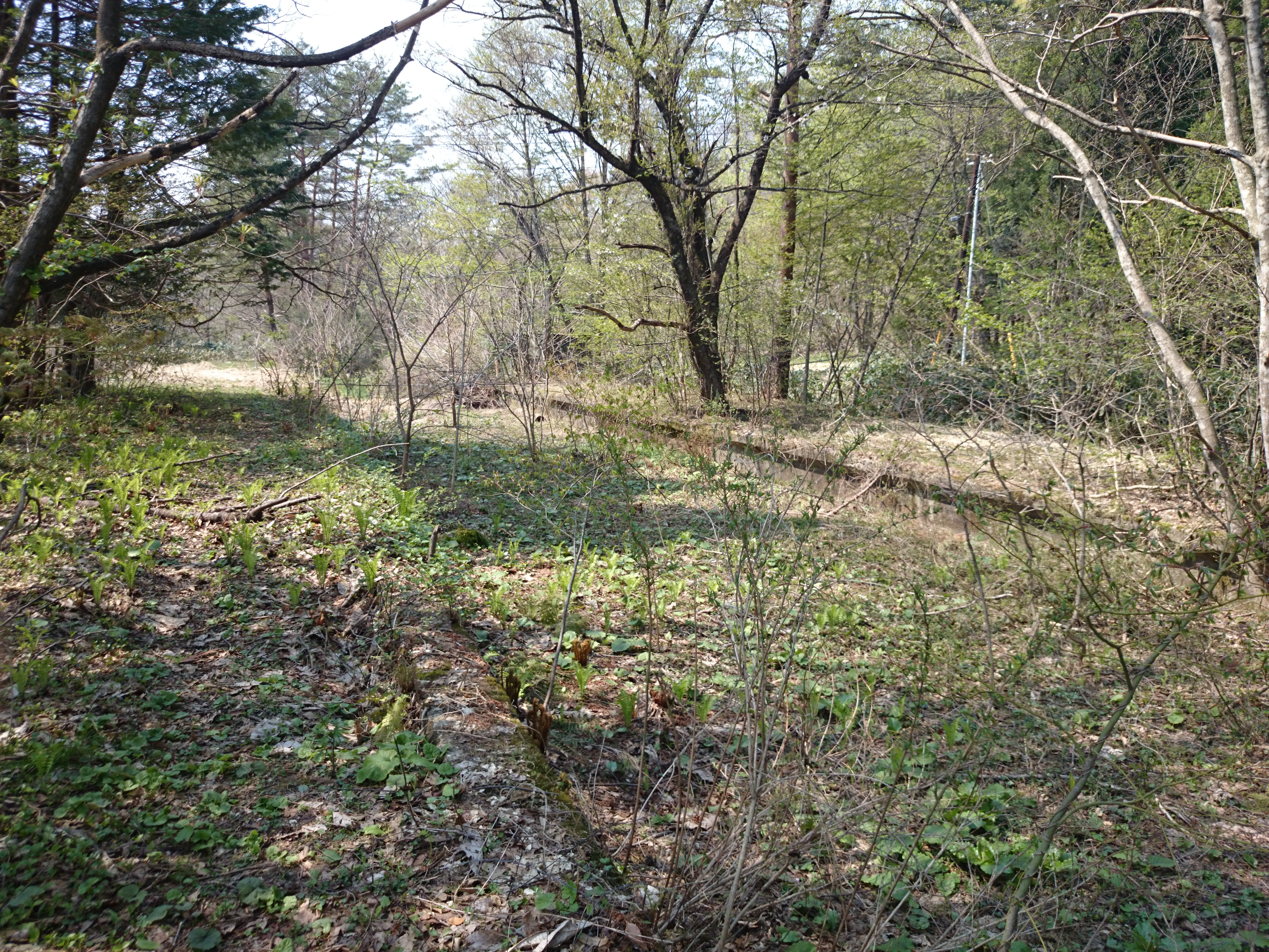 橋場駅ホーム跡